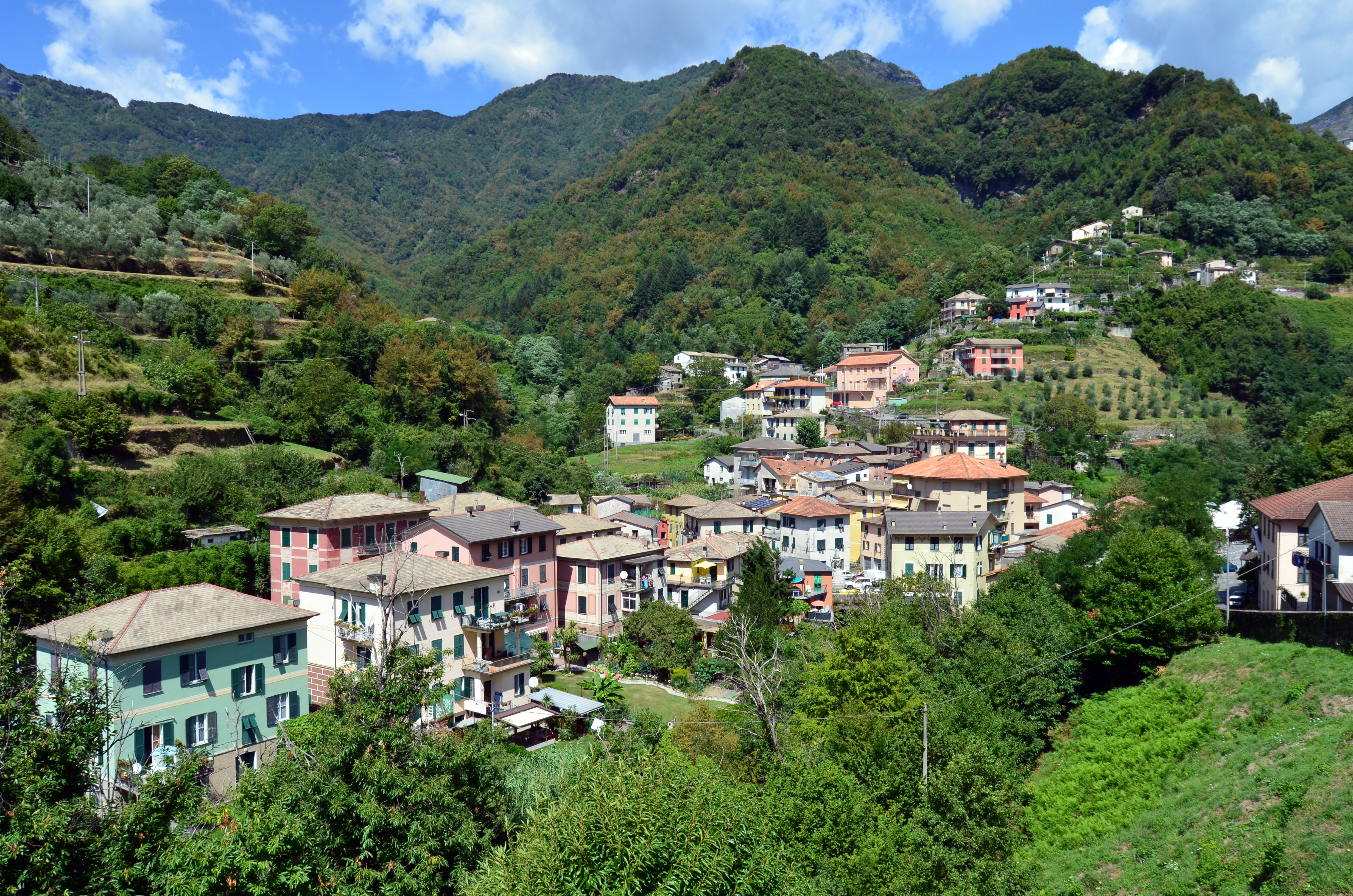 Panorama di Favale di Malvaro, Liguria, Italy